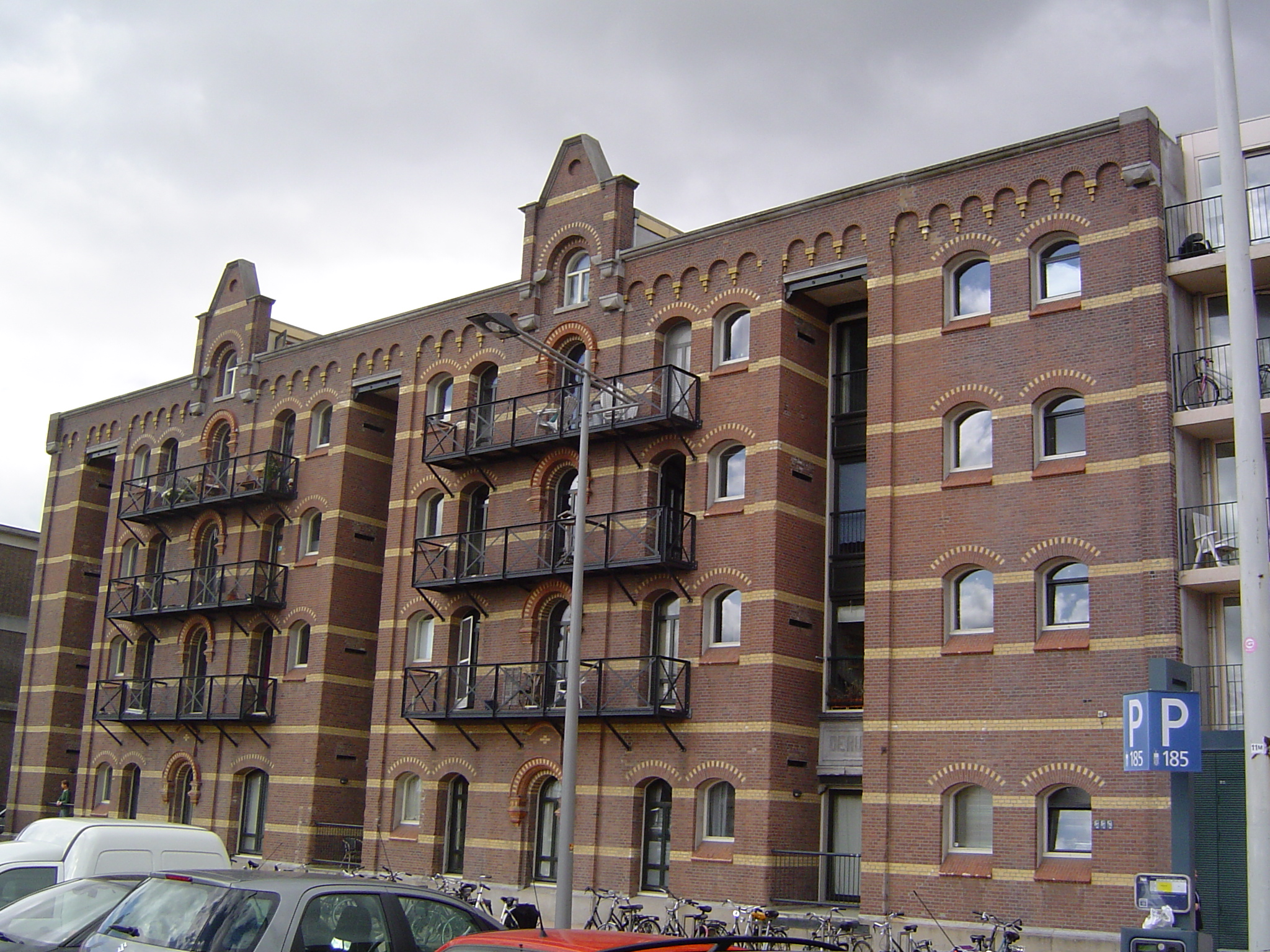 Leidsche Veem building, Rotterdam